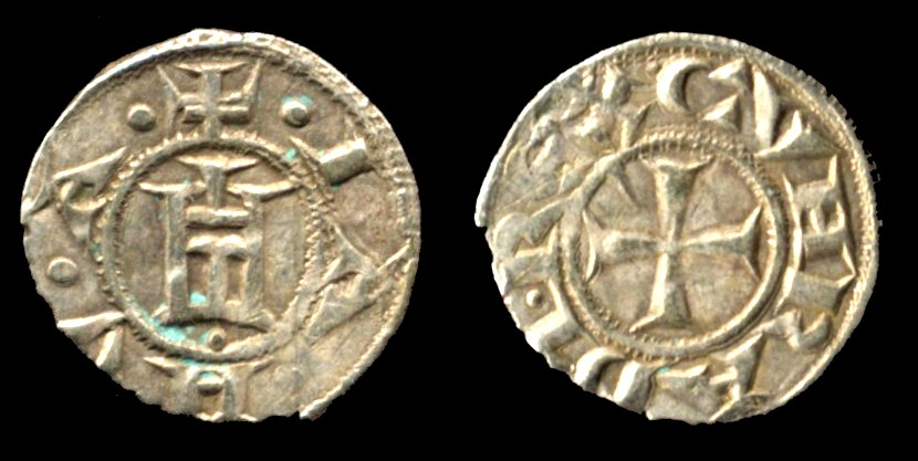 Genova: denaro (1139-1339) 16 mm; 0,63 g CNI 29 Castello; + IA • NV • A. Punto sotto la base Croce patente; CVNRADI • REX •